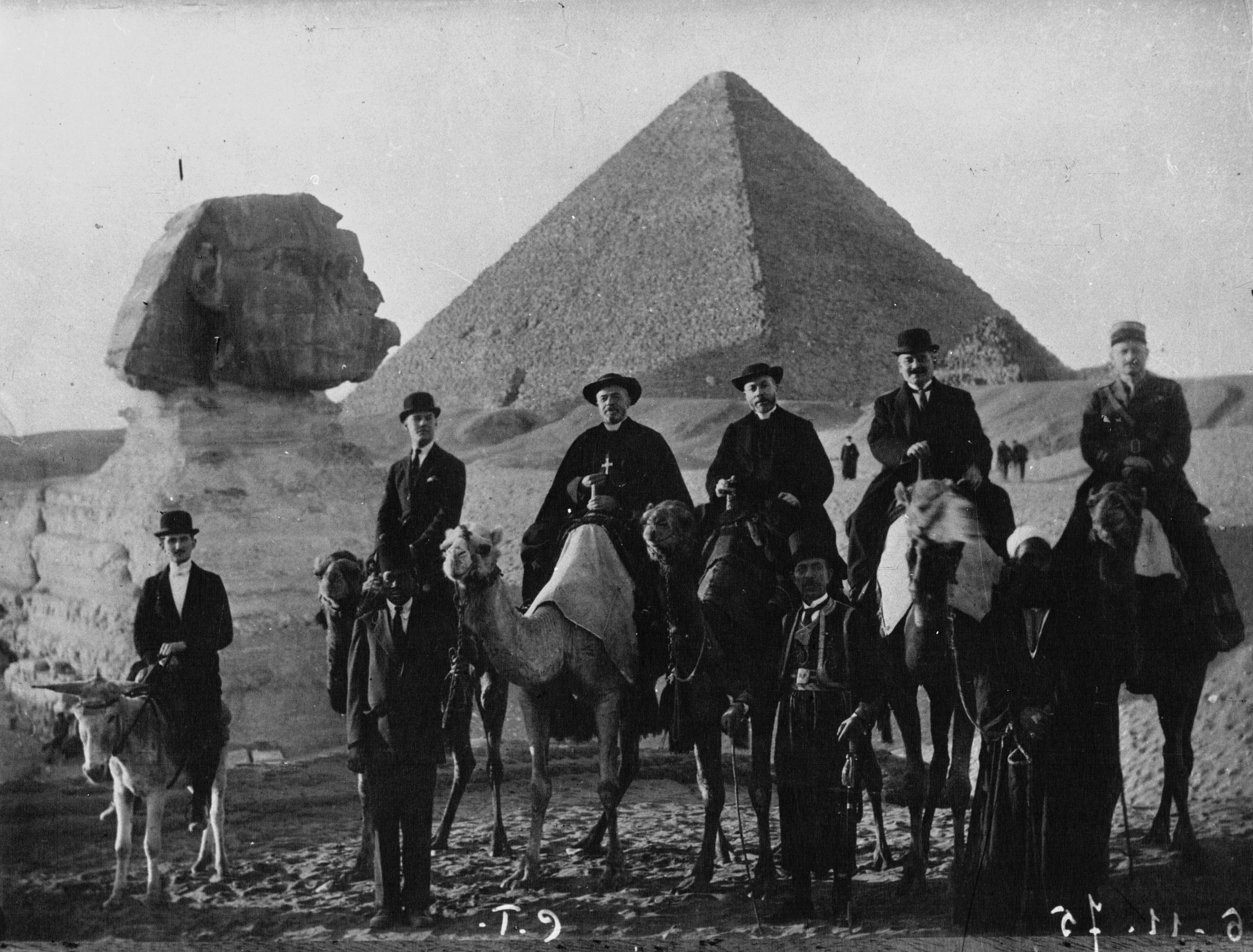 Monseigneur Grente photographié devant les pyramides d'Egypte aux côtés de Monseigneur Dubois (photographie de presse)